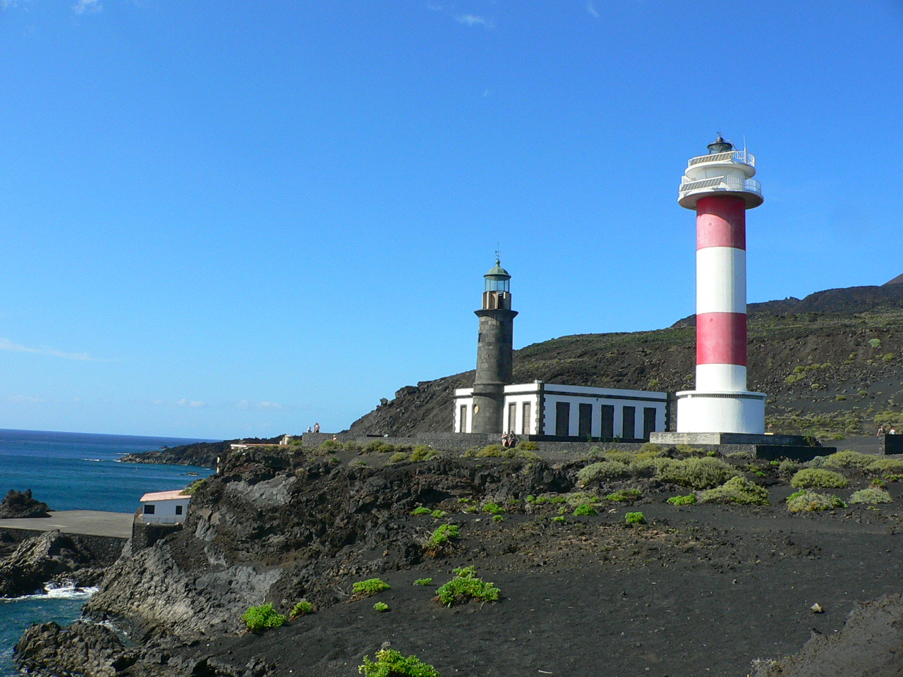 Faro de Fuencaliente (La Palma - Islas Canarias)